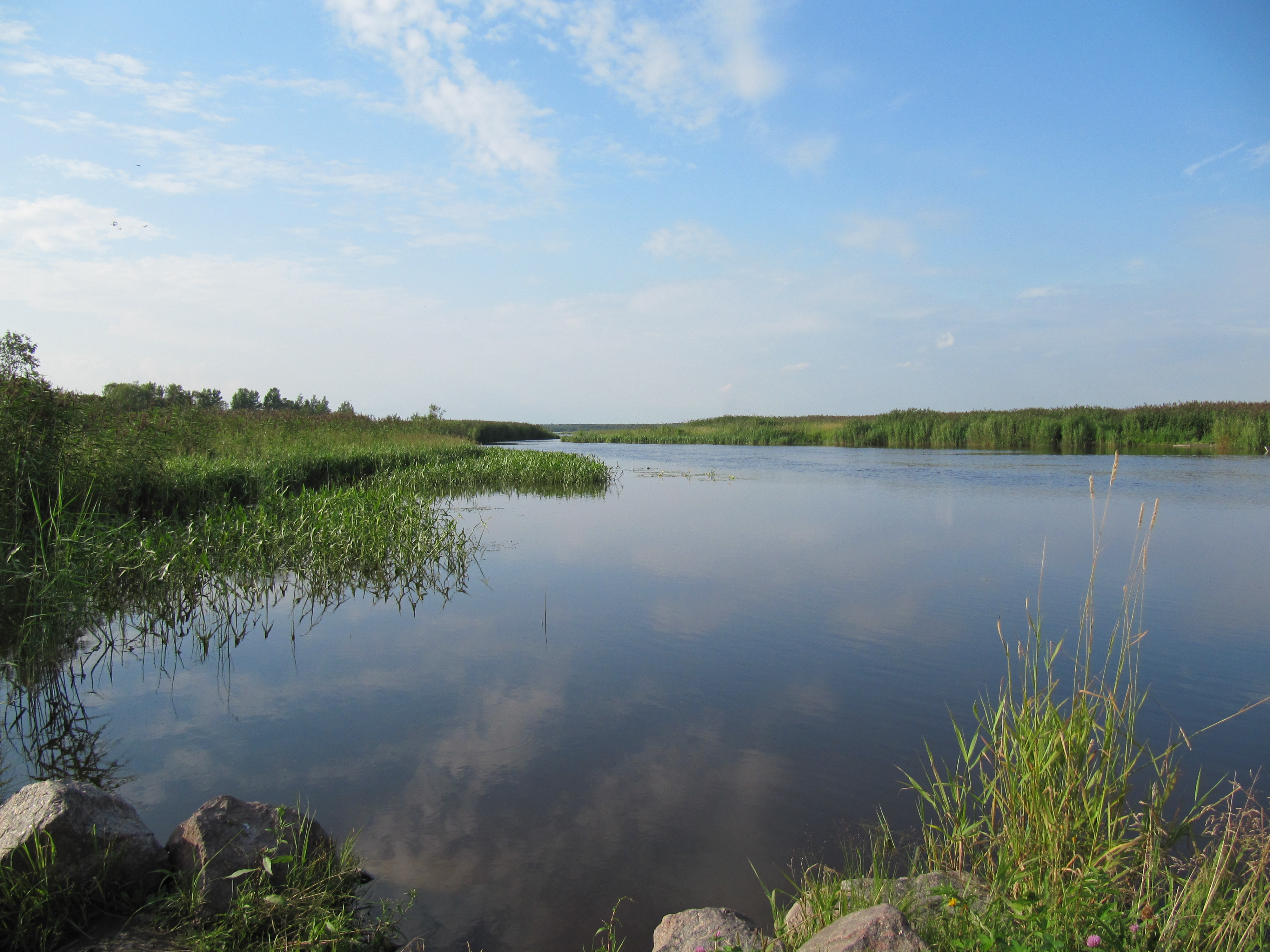 Лахтинский разлив